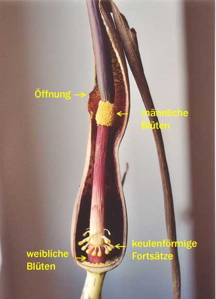 Sauromatum Blütenstand längs aufgeschnitten Foto by Thomas Lendl 2004